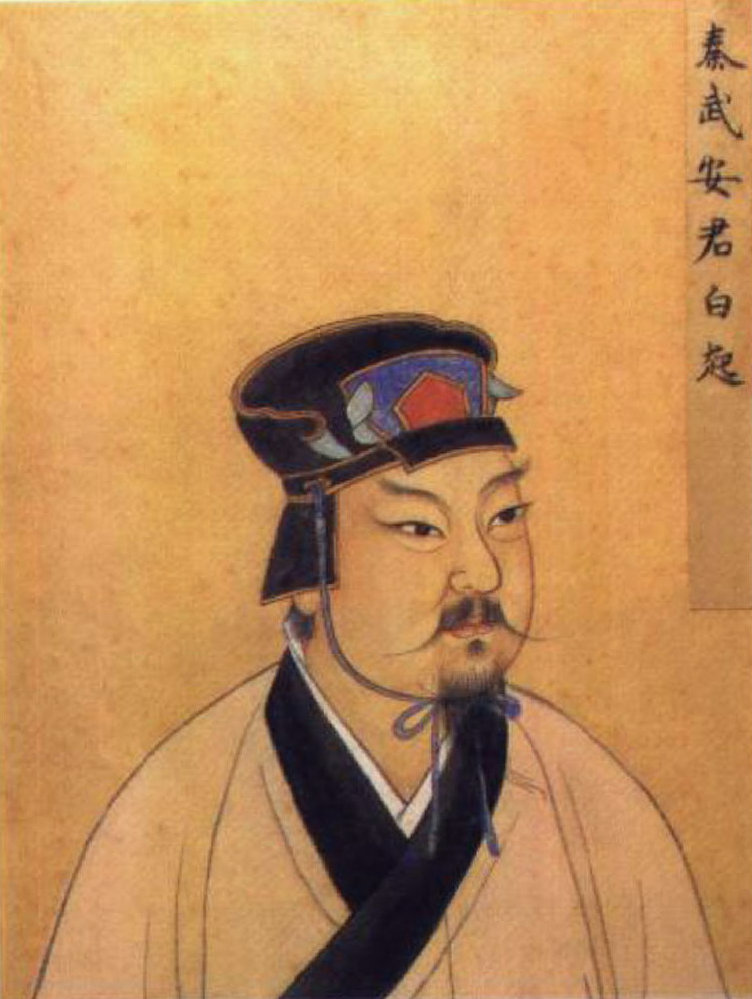 白起画像，明人绘